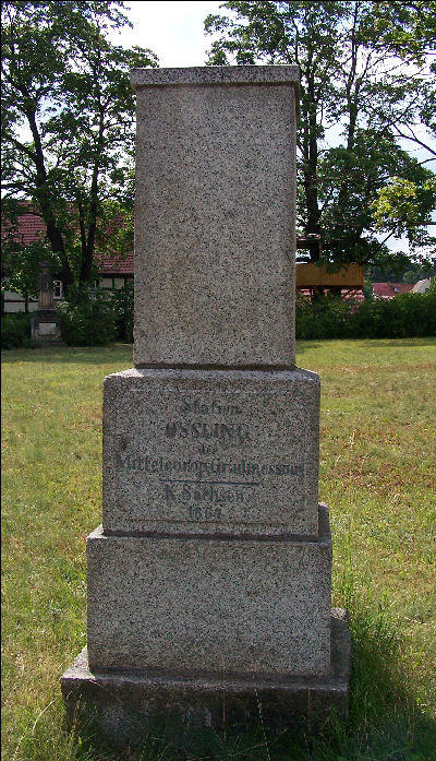 Nagelsche Säule, Oßling, Mitteleuropäische Gradmessung 1864